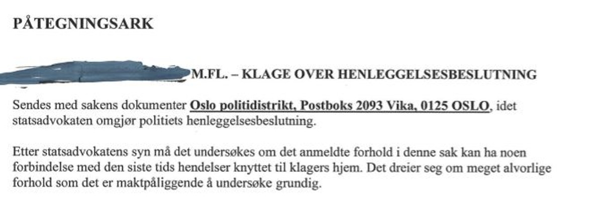 Klagesaken som utløste politiets begjæring mot teaterdirektør Anne-Cécile Sibué-Birkeland og de tre kunstnerne bak forestillingen «Ways of seeing» etter at politiet først hadde henlagt saken.